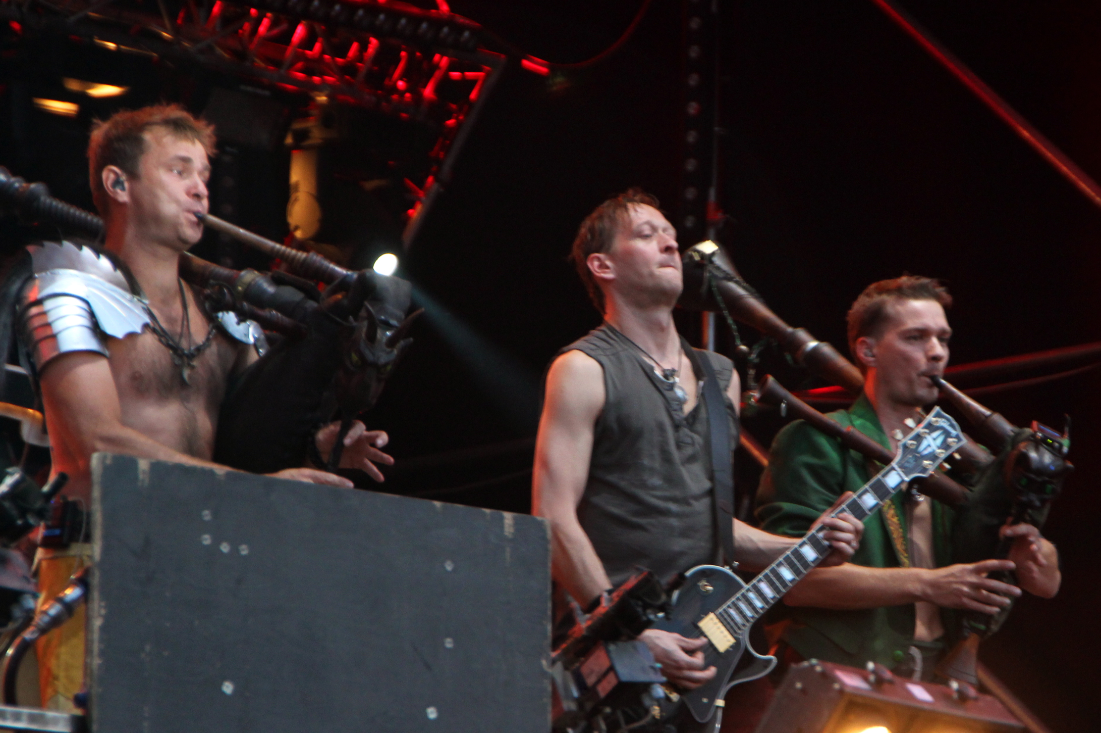 Przystanek Woodstock w 2012 r.